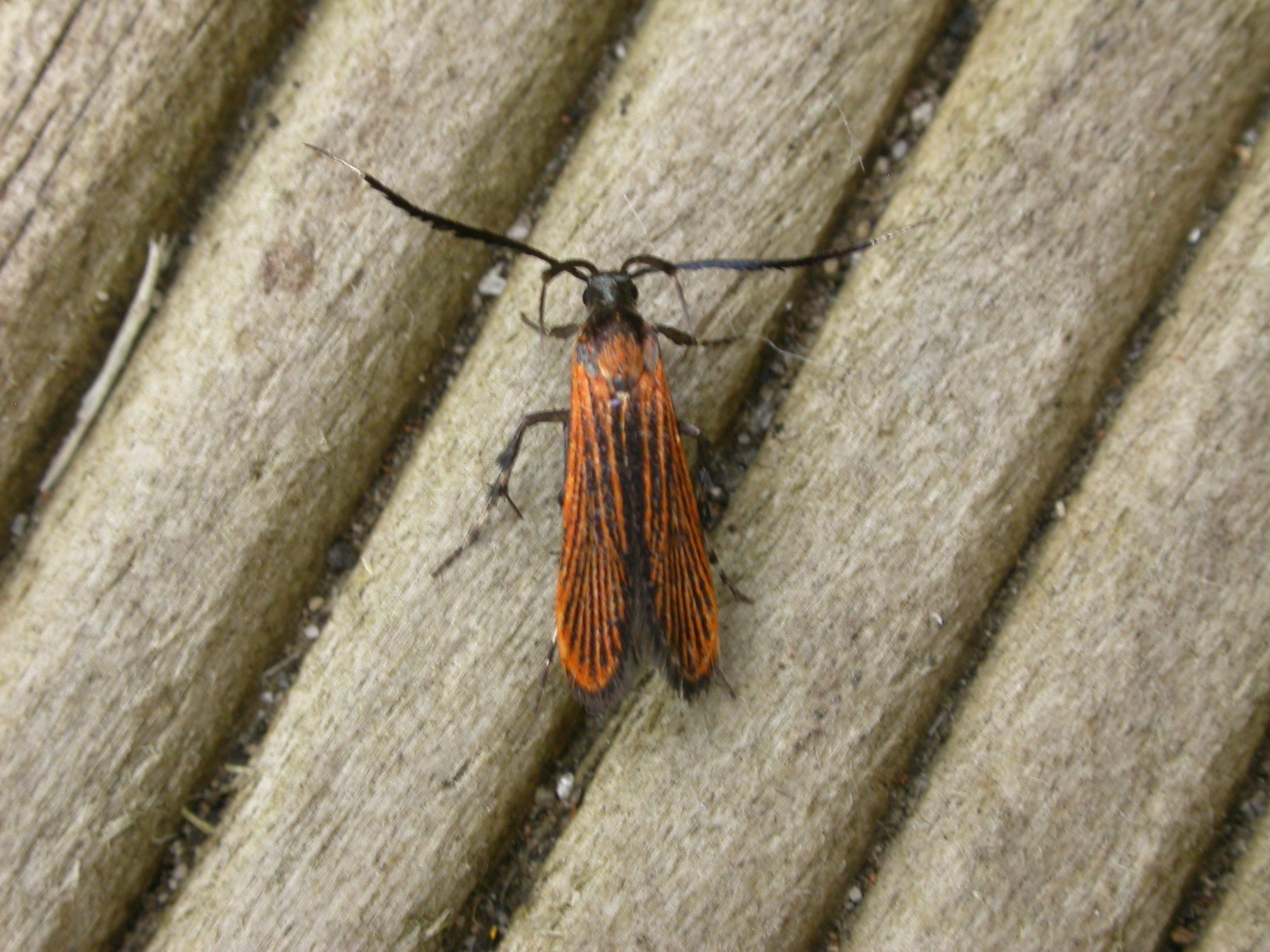 Snellenia lineata (Walker, 1856), Burrill Lake, NSW, 6/7 February 2012